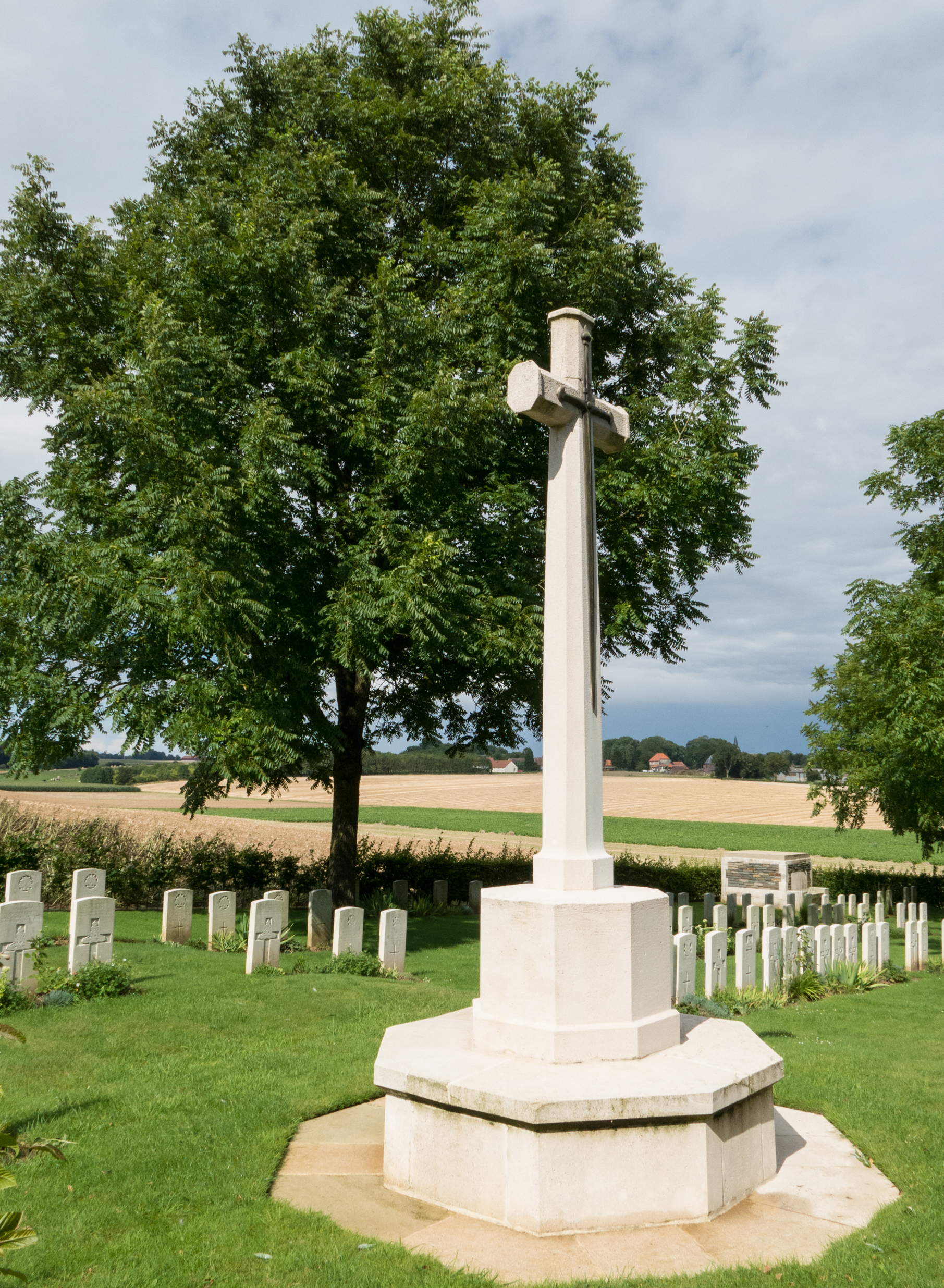 Peake Wood Cemetery